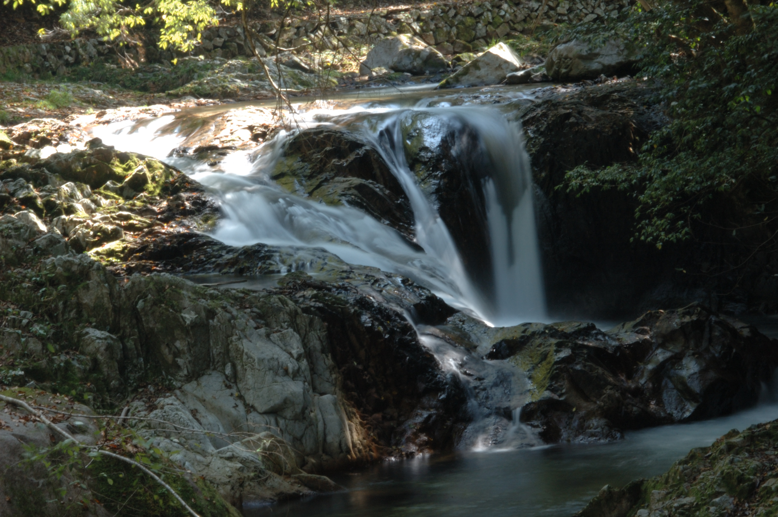 Momiji waterfall in Yaedaki waterfalls